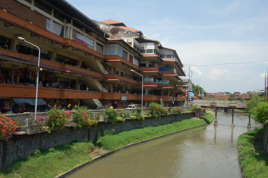 Pasar Kumbasari di Bali